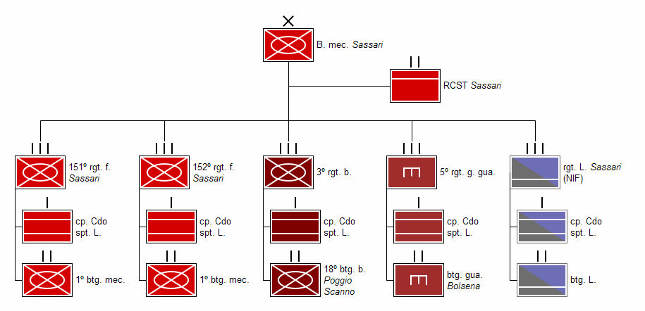 Attuale struttura della Brigata "Sassari"